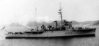 Die britische Minensuch-Sloop HMS NIGER